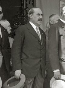 Título original: Recibimiento al general Miguel Primo de Rivera en el Ayuntamiento de San Sebastián (2/6) Localización: San Sebastián (Guipúzcoa)